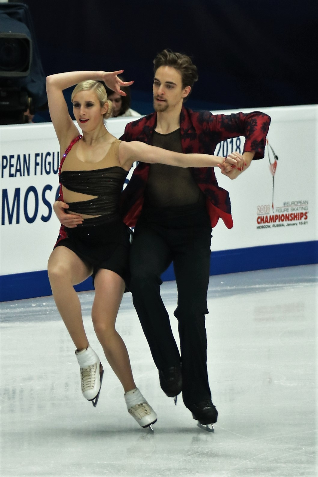 Анна Яновская / Адам Лукач (Венгрия) на Чемпионате Европы по фигурному катанию 2018.